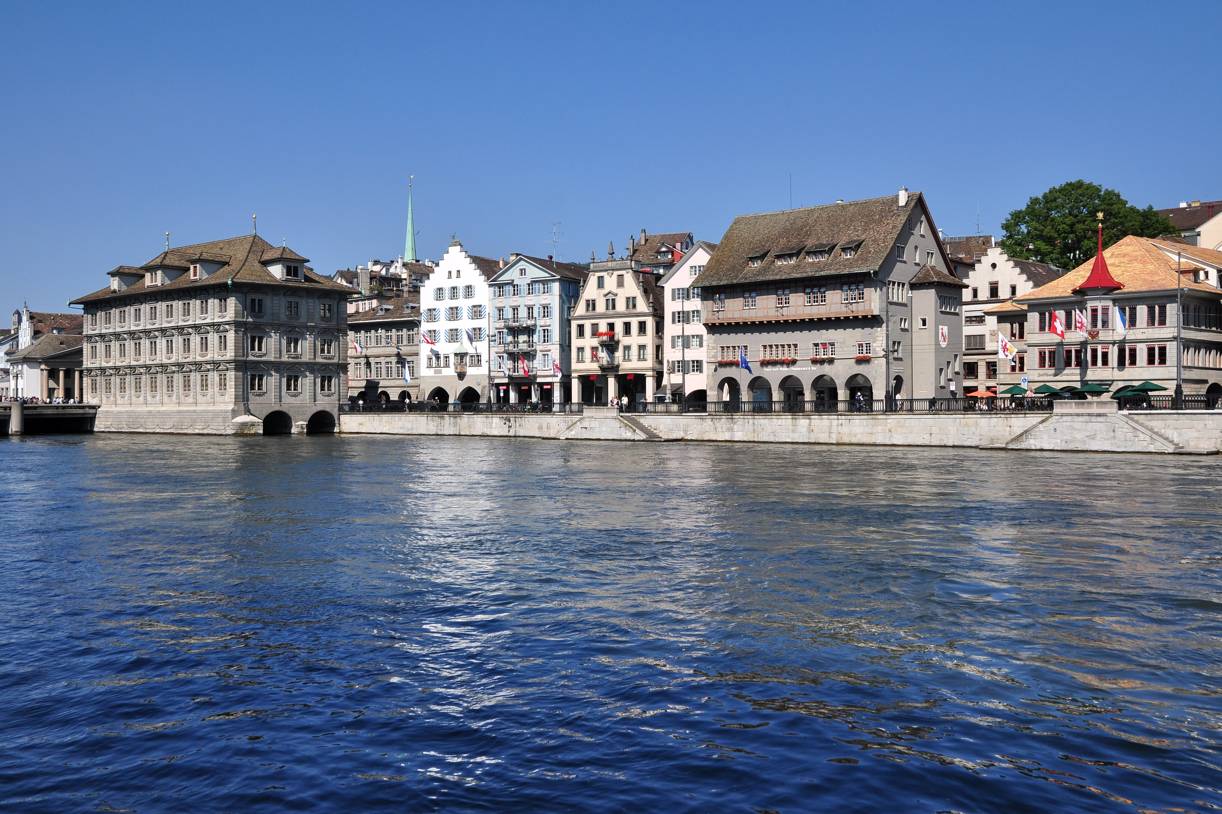 Rathaus, Zunfthaus zur Haue, Haus zum Rüden and Zunfthaus zur Zimmerleuten at Limmatquai in Zürich (Switzerland), as seen from Münsterbrücke towards Münsterhof.